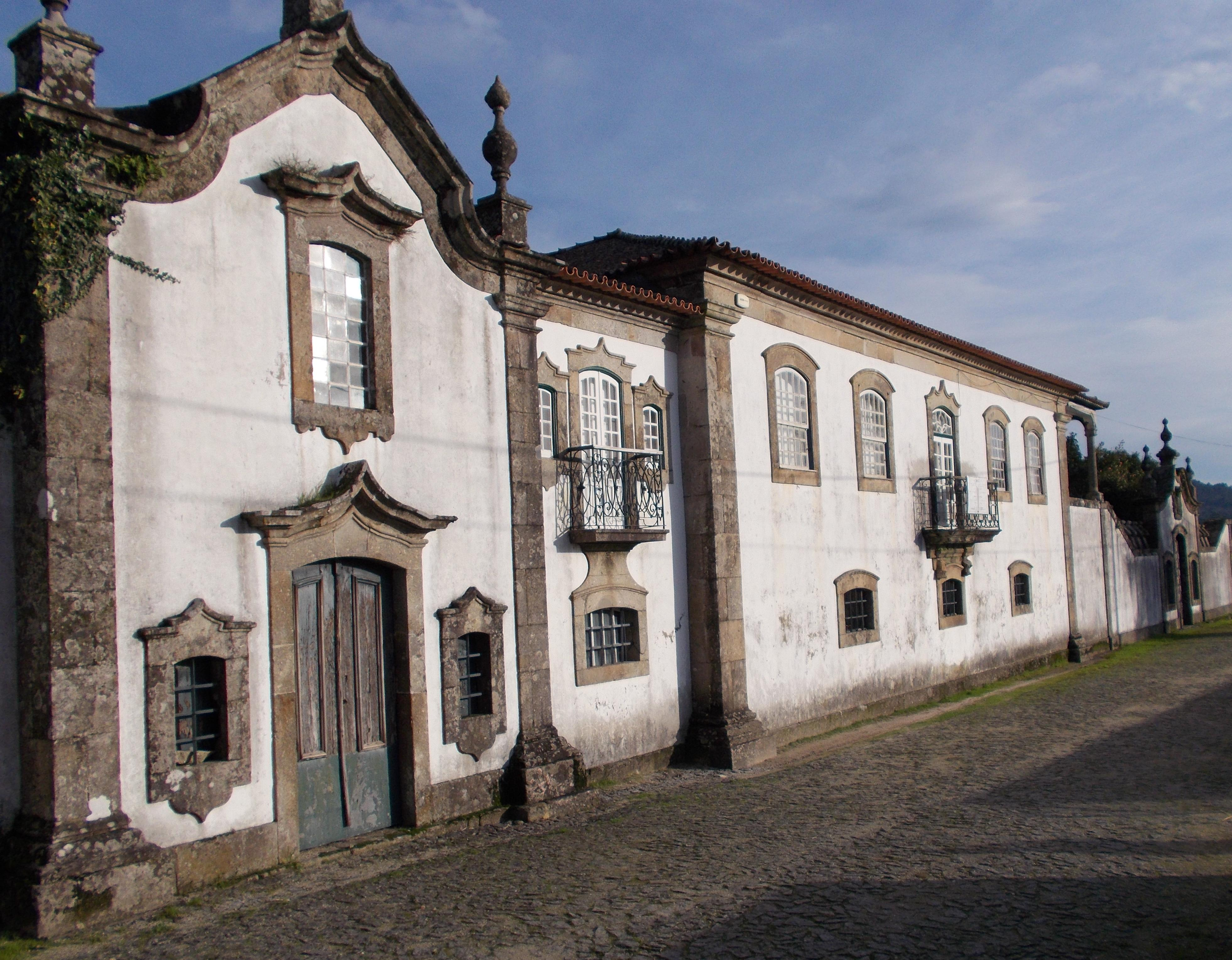 Paço dos Condes de Carcavelos, Coucieiro, Vila Verde.